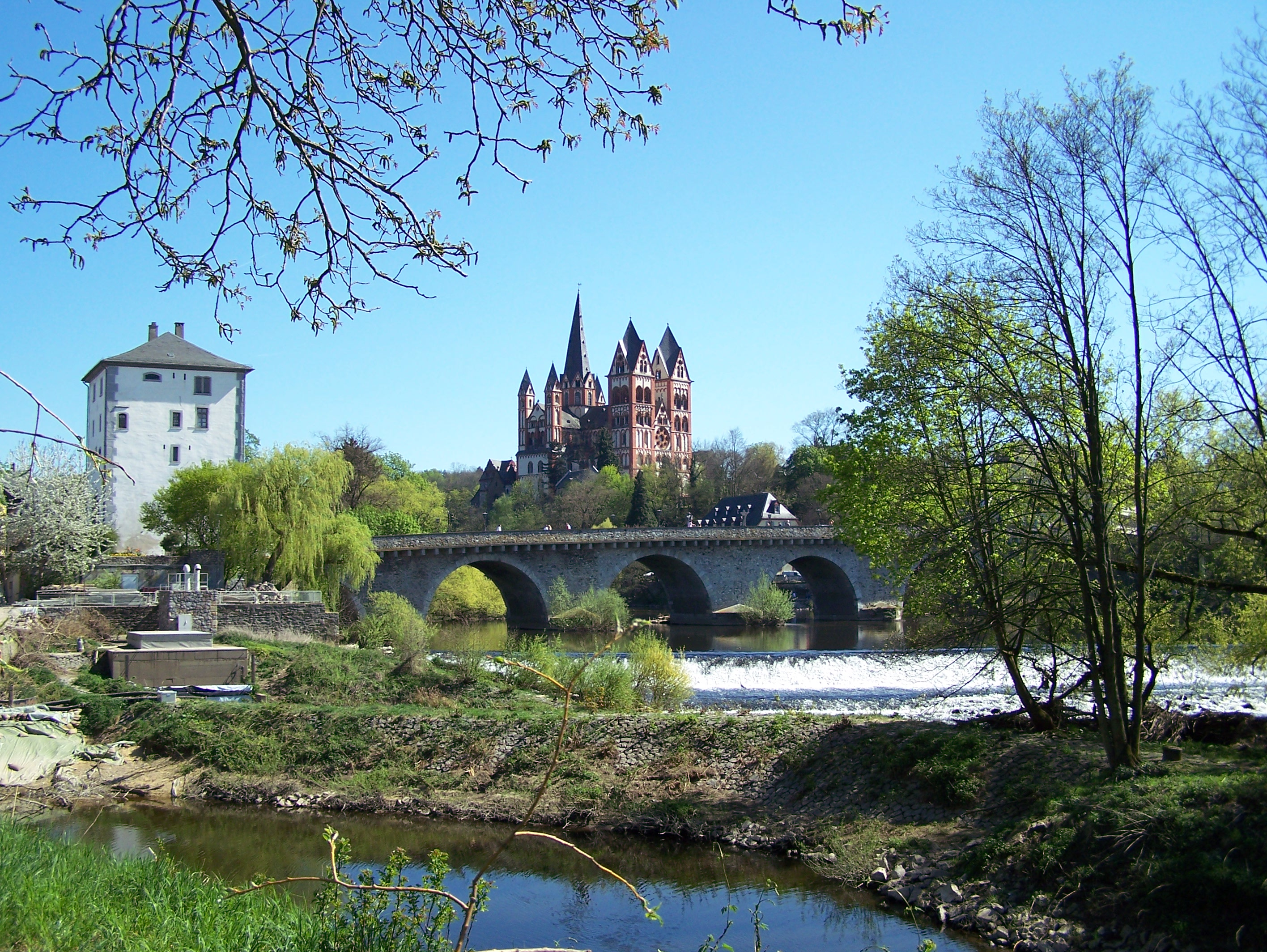 Limburger Dom und Alte Lahnbrücke